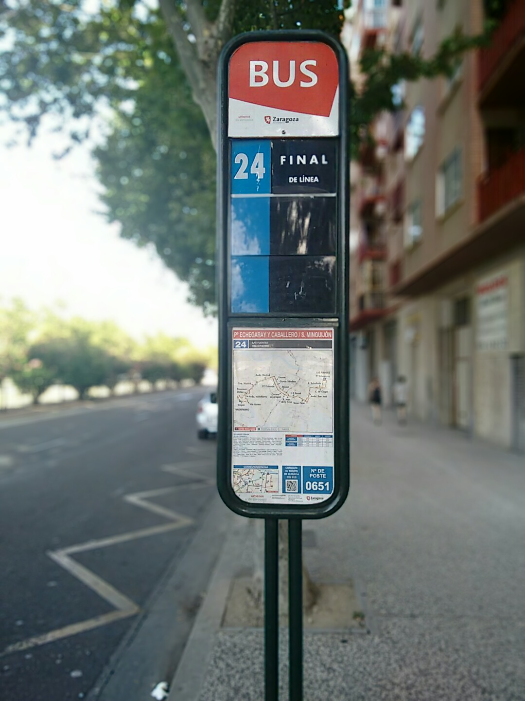 Final de línea 24, Urbanos de Zaragoza